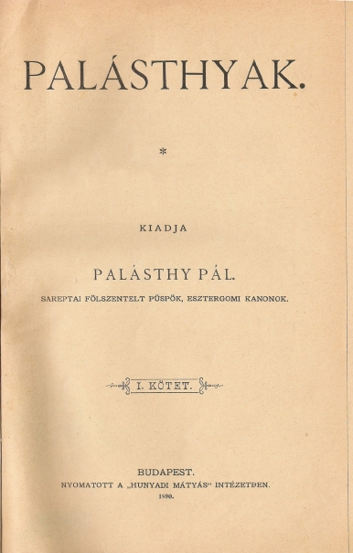 A Palásthyak című könyv címlapja 1890-ből